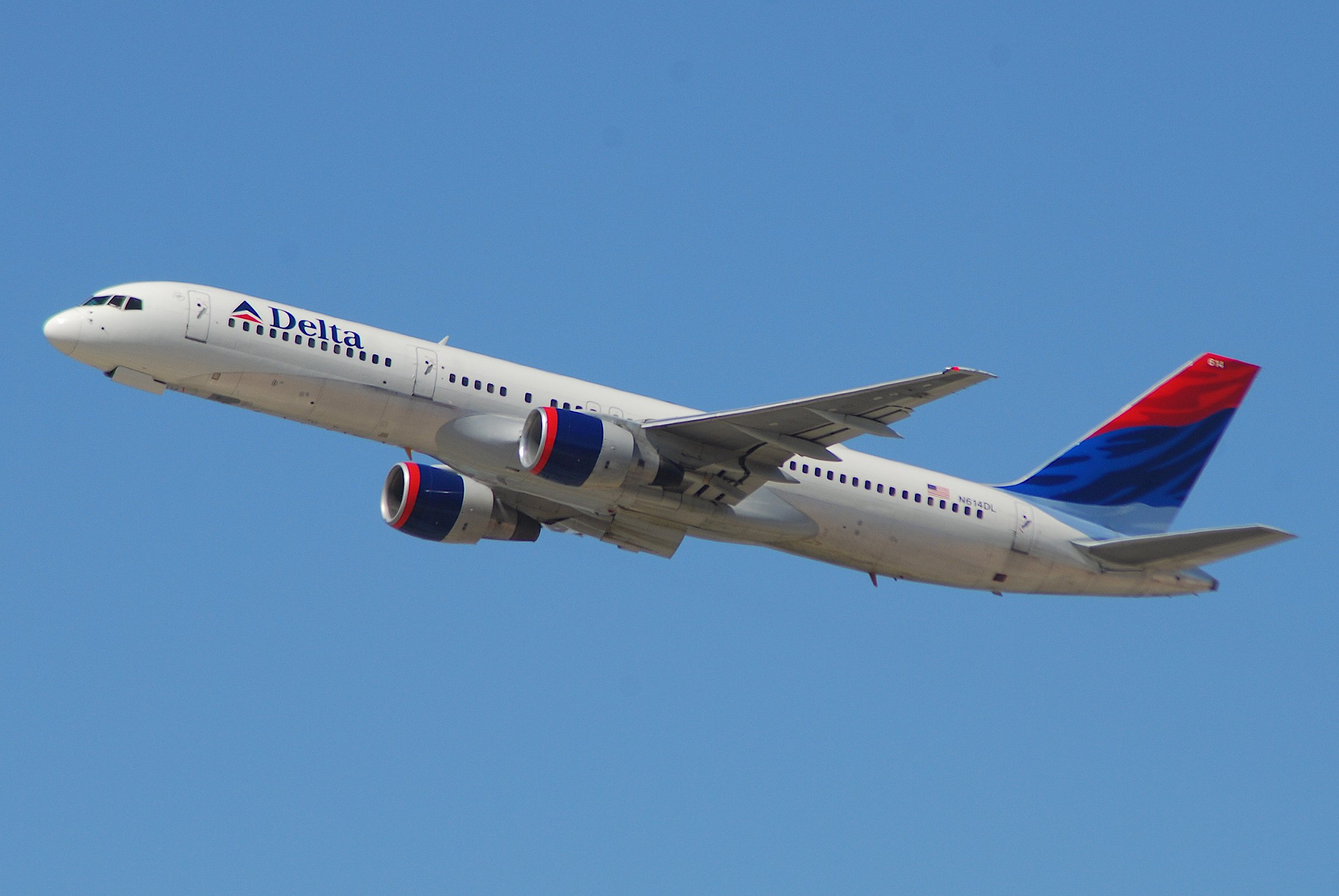 Delta Air Lines Boeing 757-232; N614DL@LAX;18.04.2007/463qm